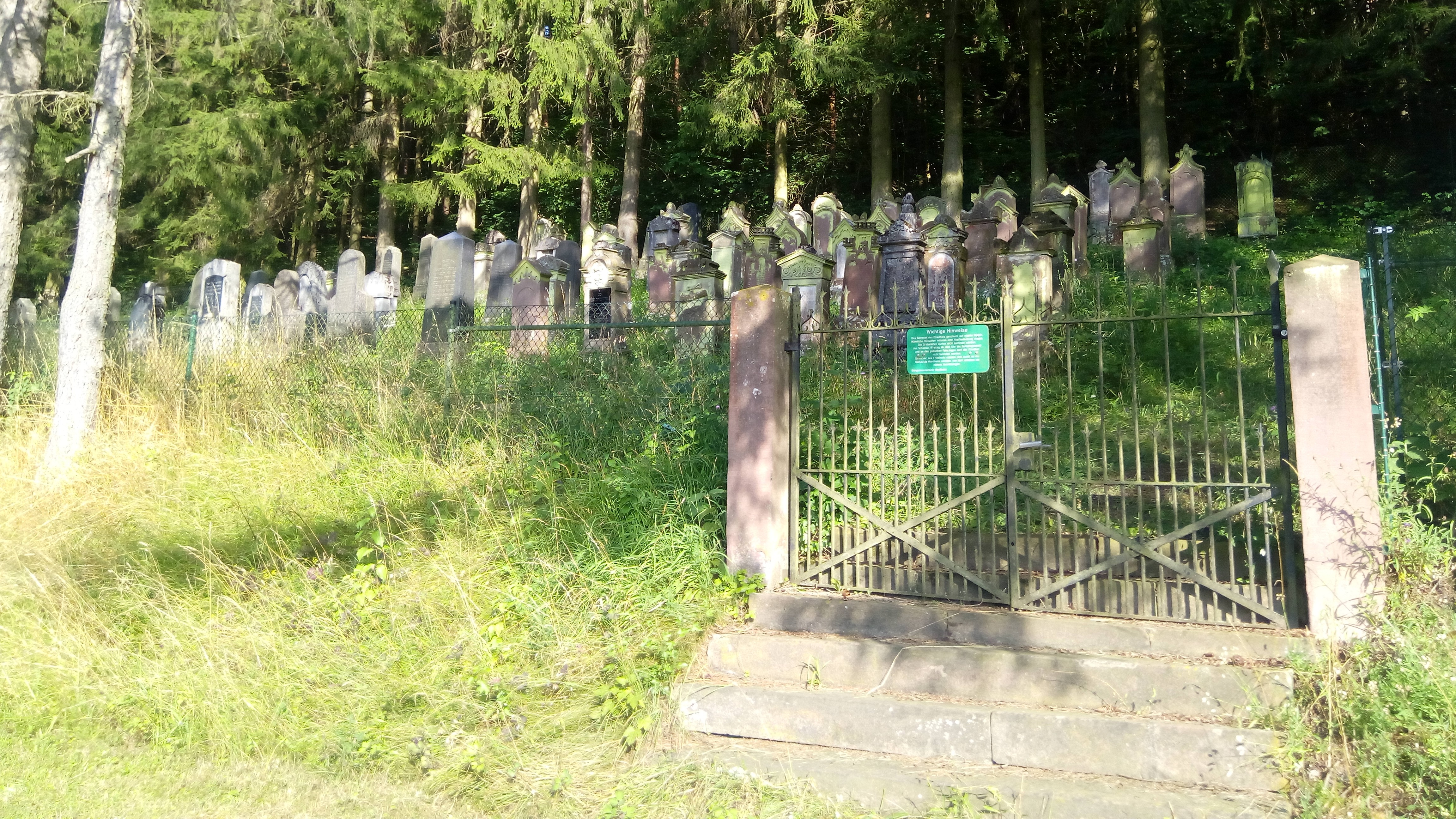 Judenfriedhof Hardheim